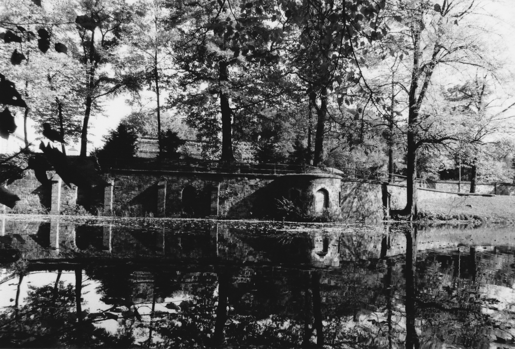 Teich im Schönherrpark in Schlosschemnitz